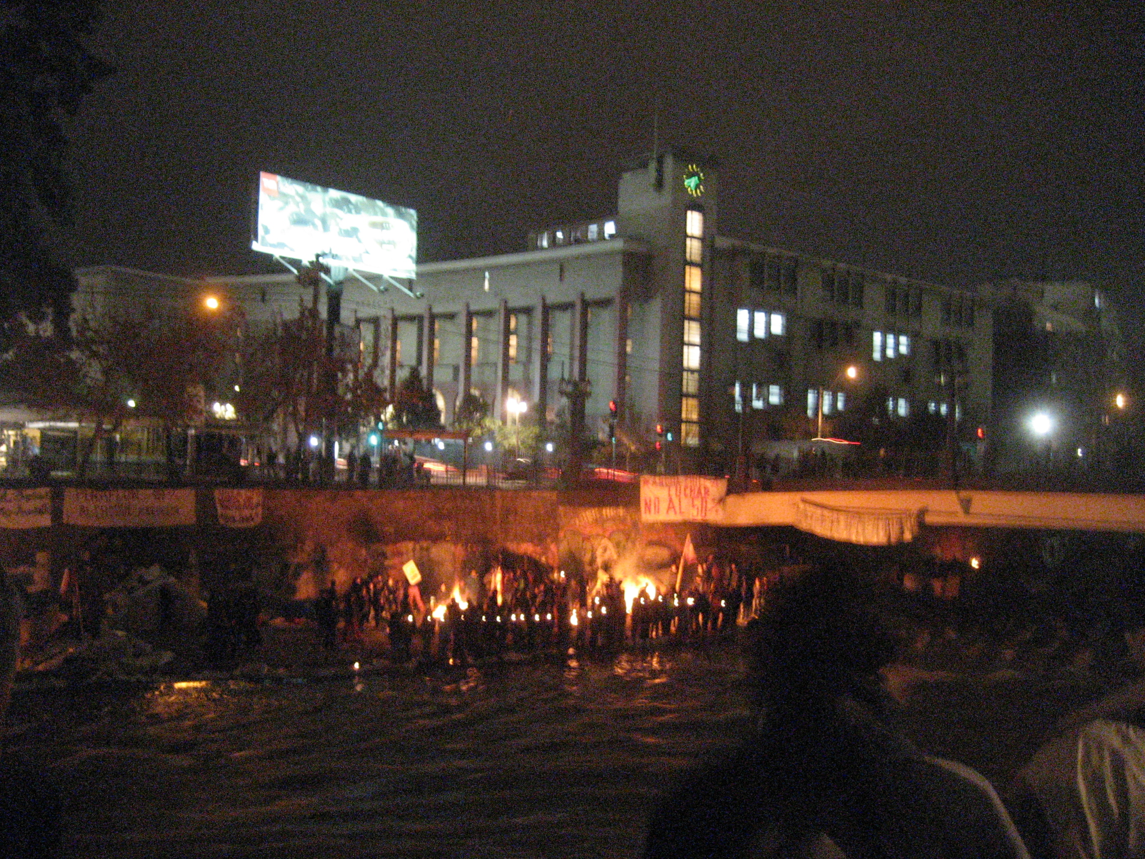 Deudores habitacionales de ANDHA Chile acampando en las riberas del río Mapocho, en Santiago de Chile. Junio de 2009.